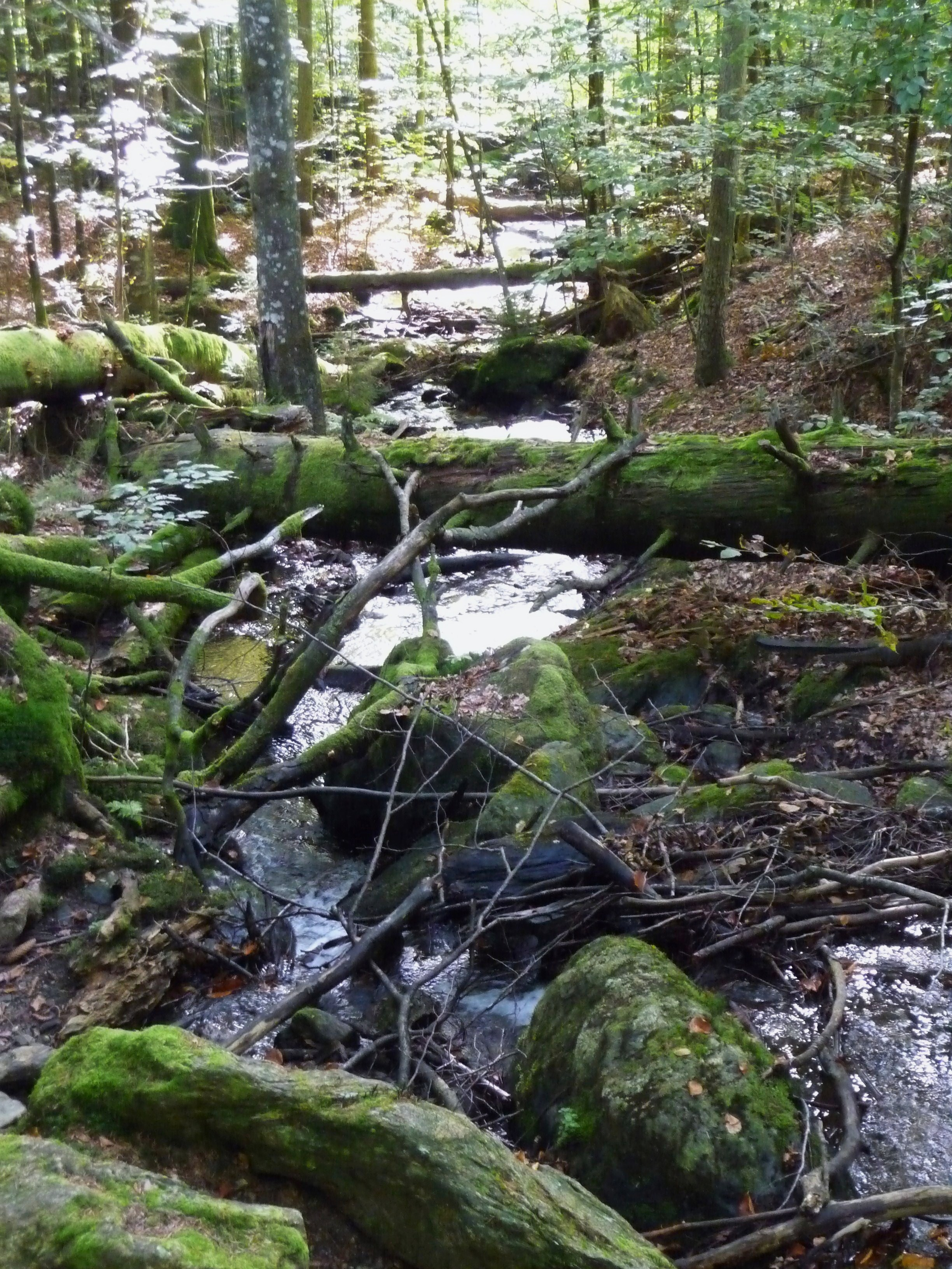 Der Mittelsteigbach im Urwald Mittelsteighütte im Nationalpark Baerischer Wald